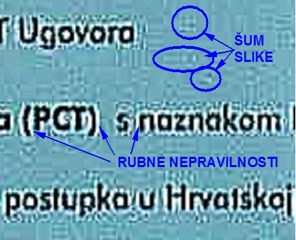 Prikaz nepravilnosti digitalnih slika